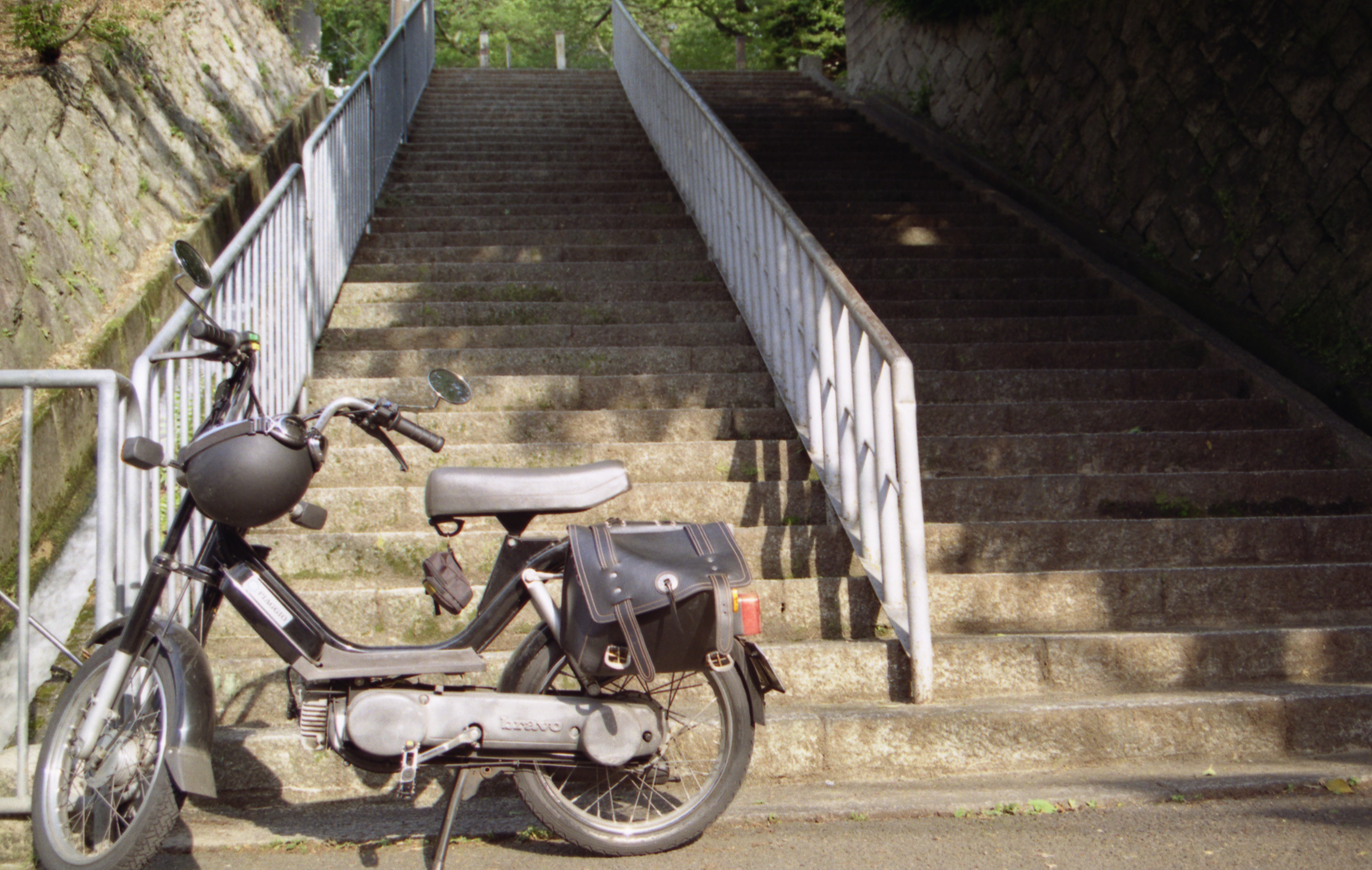 イタリア ピアジオ社製のモペッド